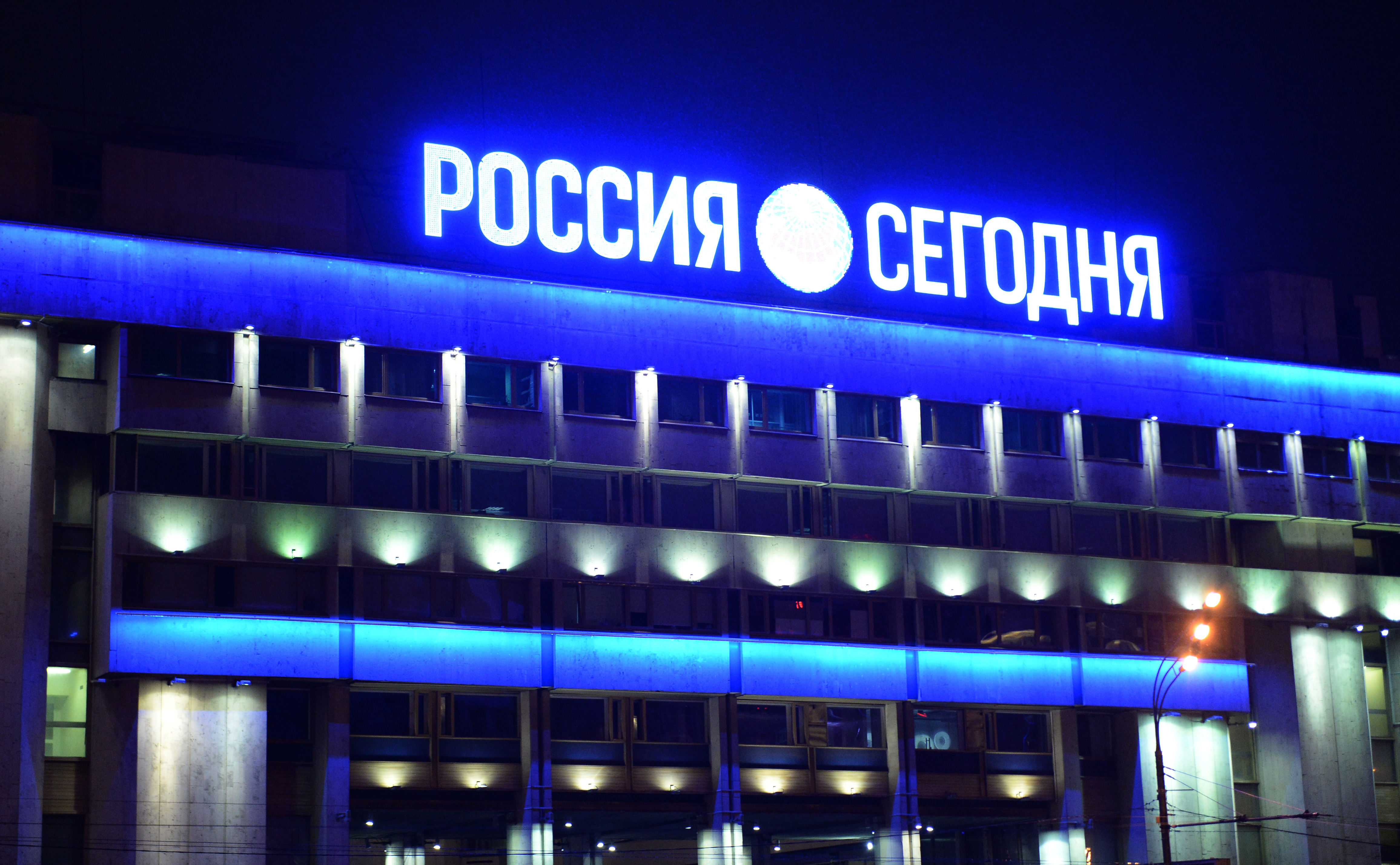 Здание международного информационного агентства «Россия сегодня» на Зубовском бульваре в Москве.